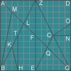 ostomachion grid letters